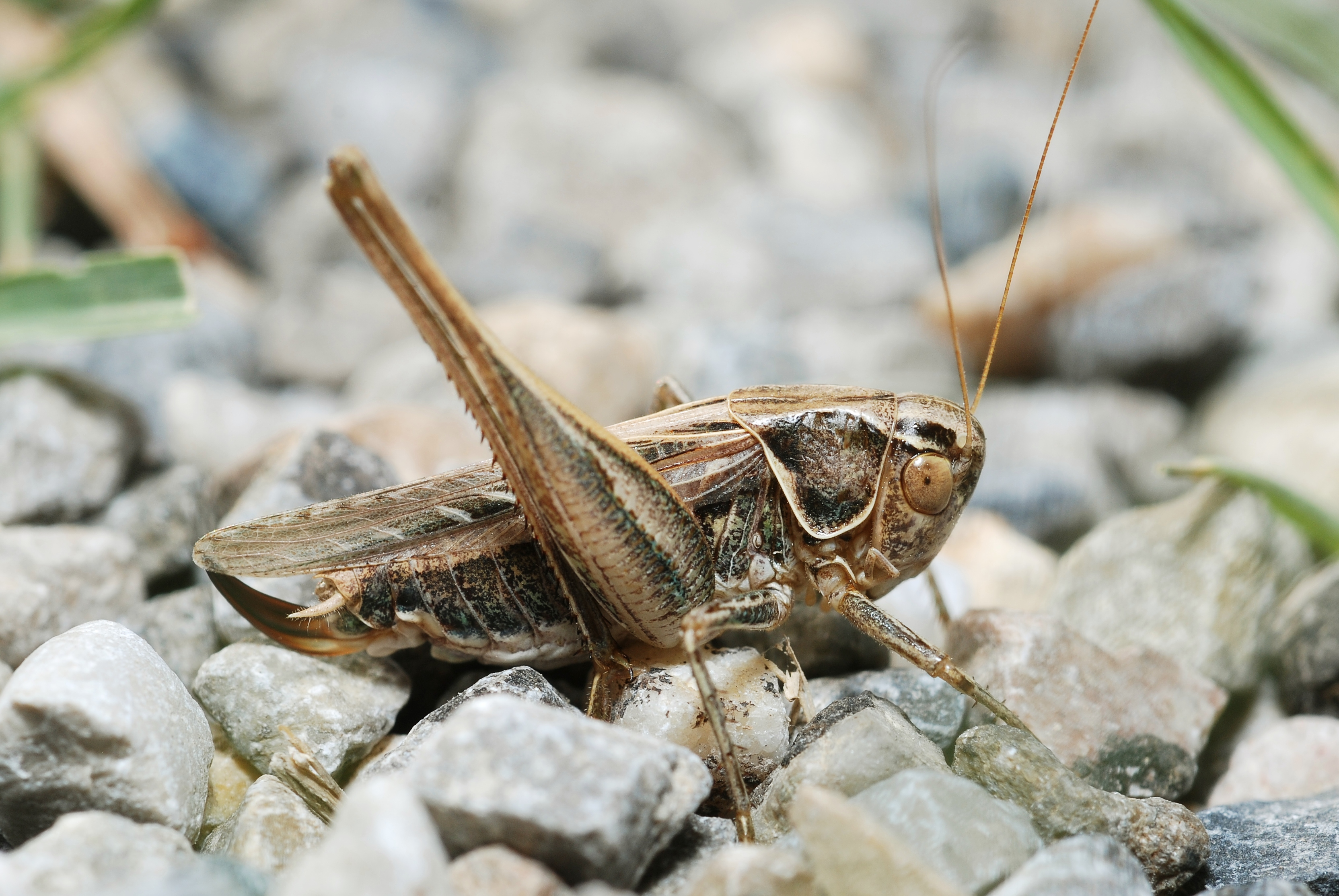 Platycleis tesselata female